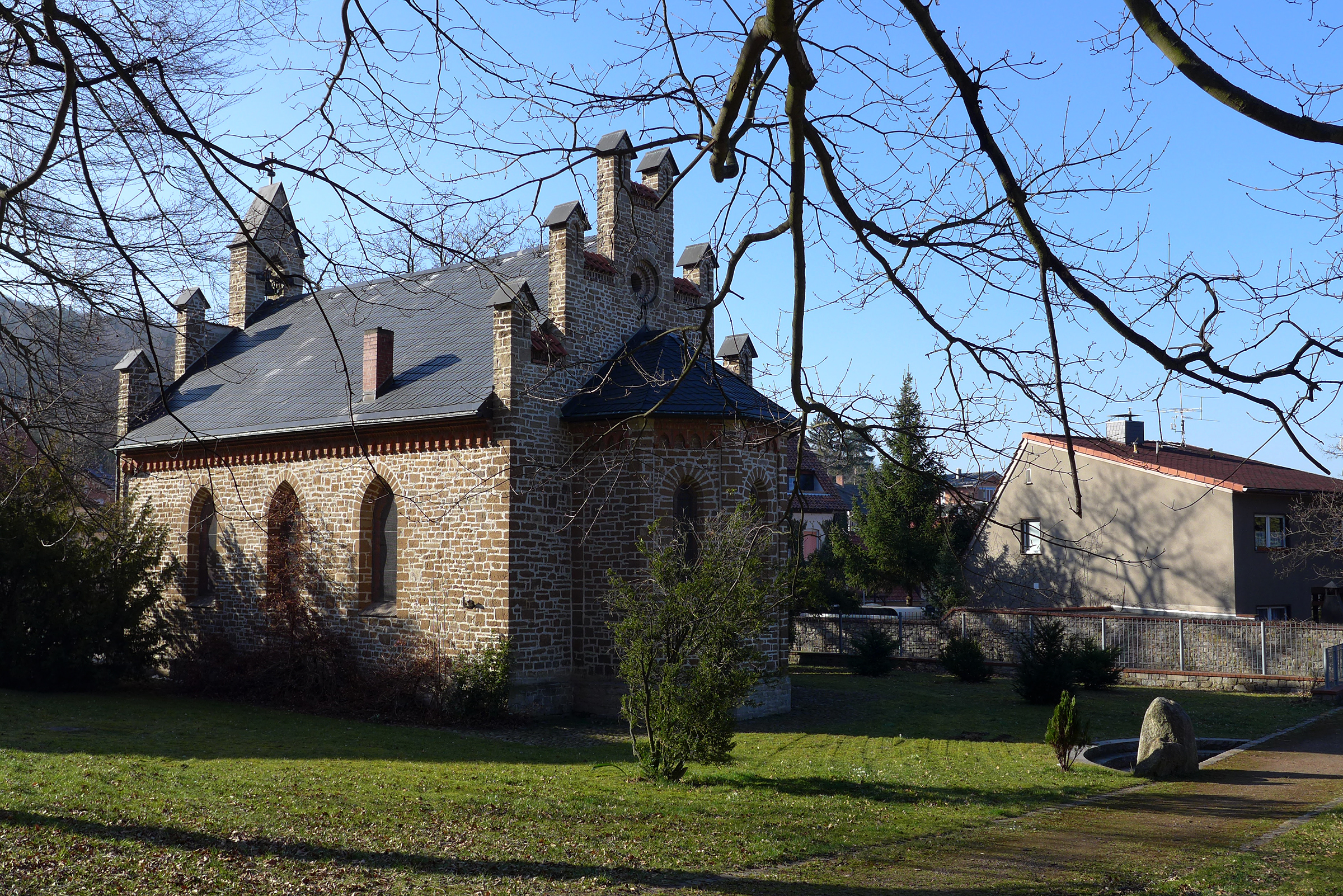 Dorfkirche in Stecklenberg, Harz